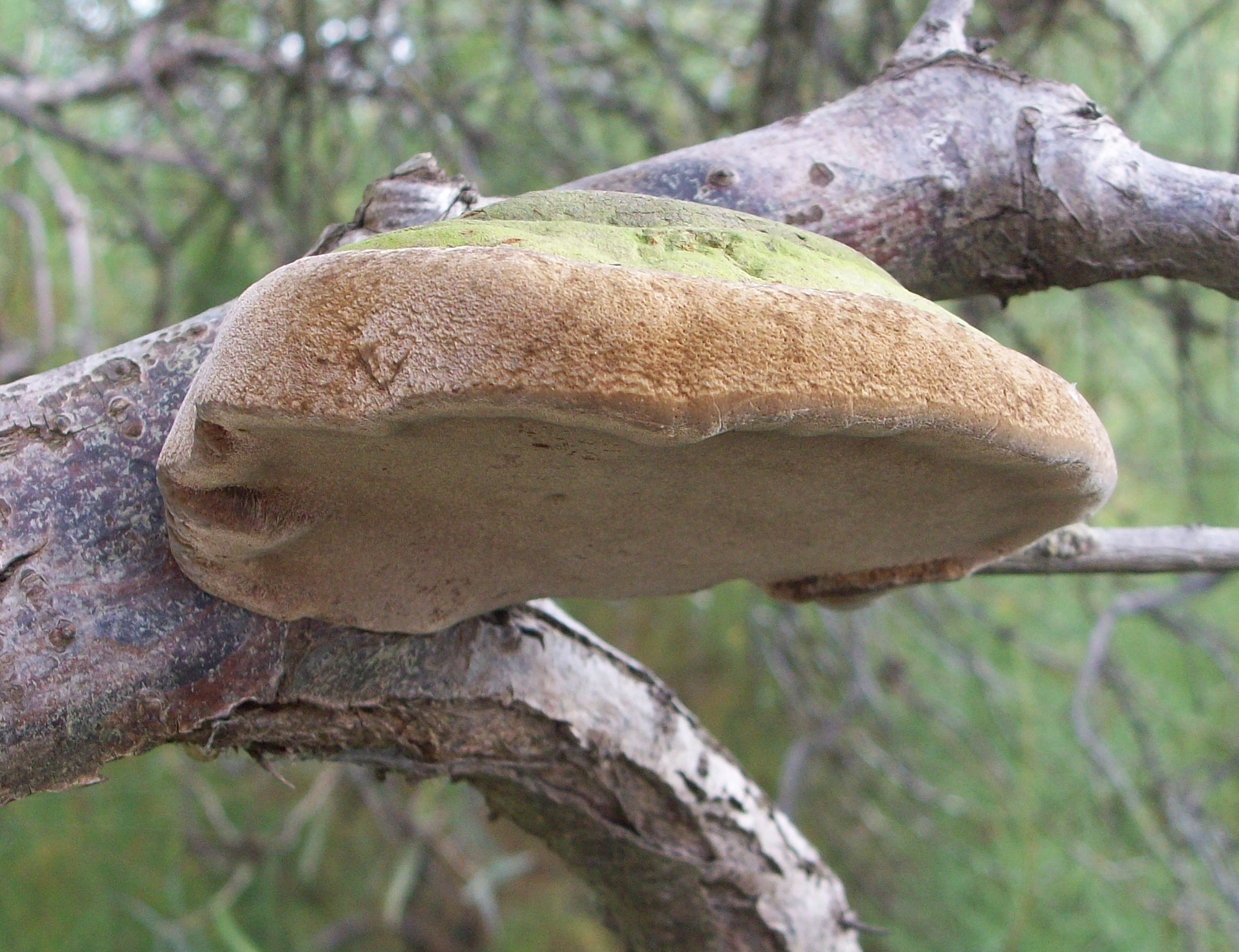 Phellinus hippophaecola, phellin de l'argousier, phellinus robustus f.hippophae 59210